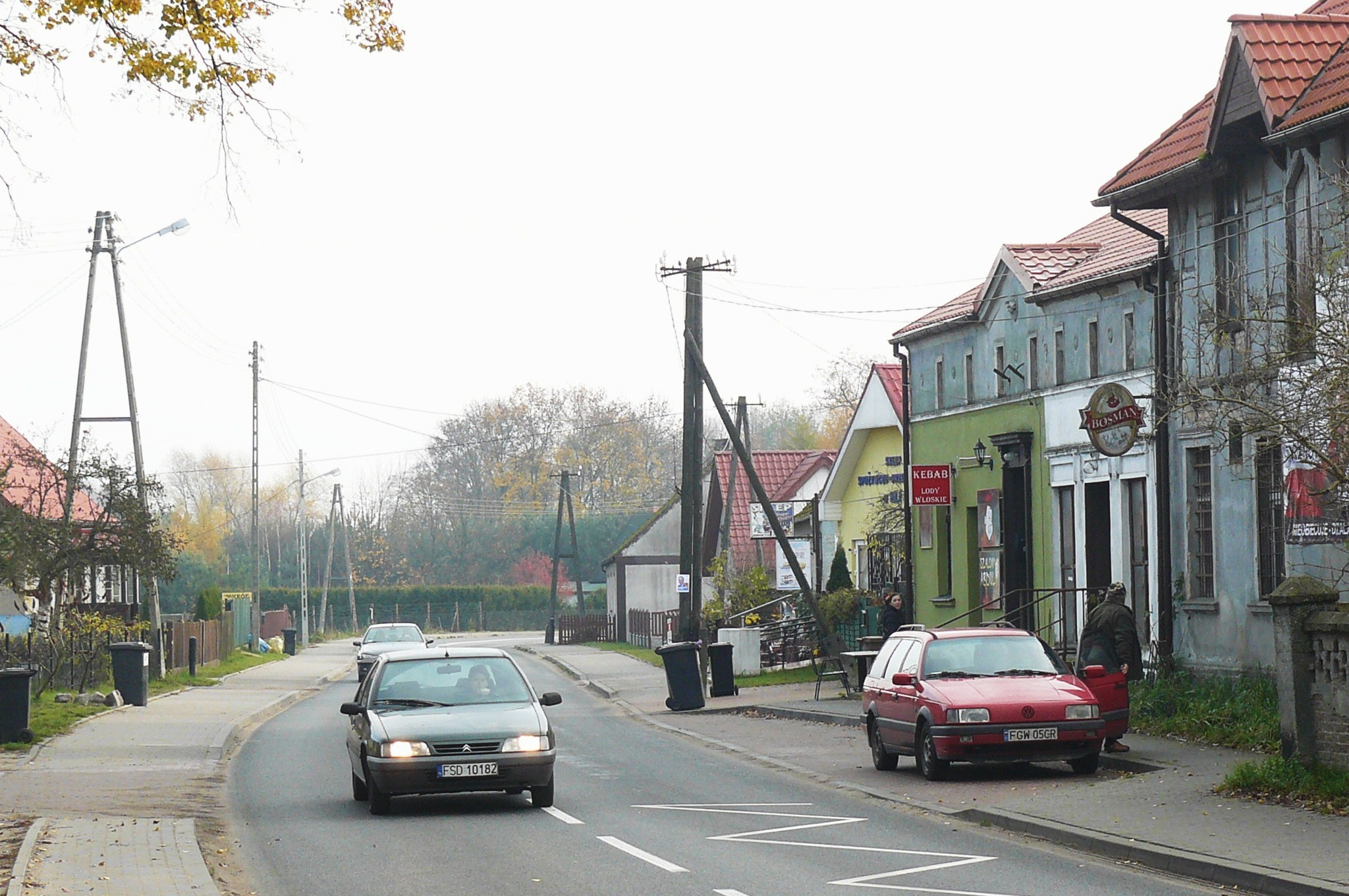 Centrum Gościmia.